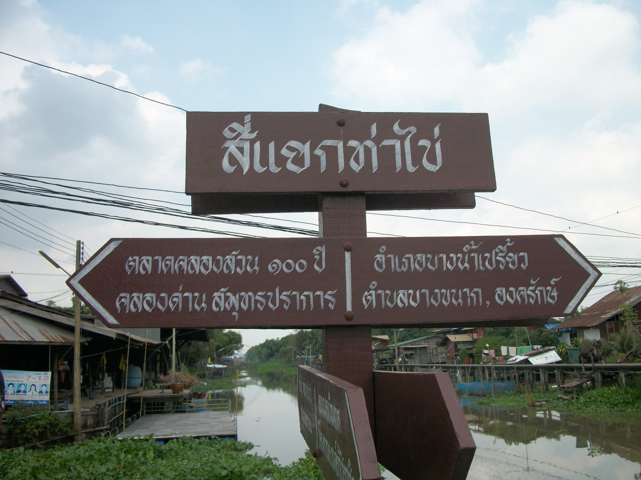 สี่แยกท่าไข่